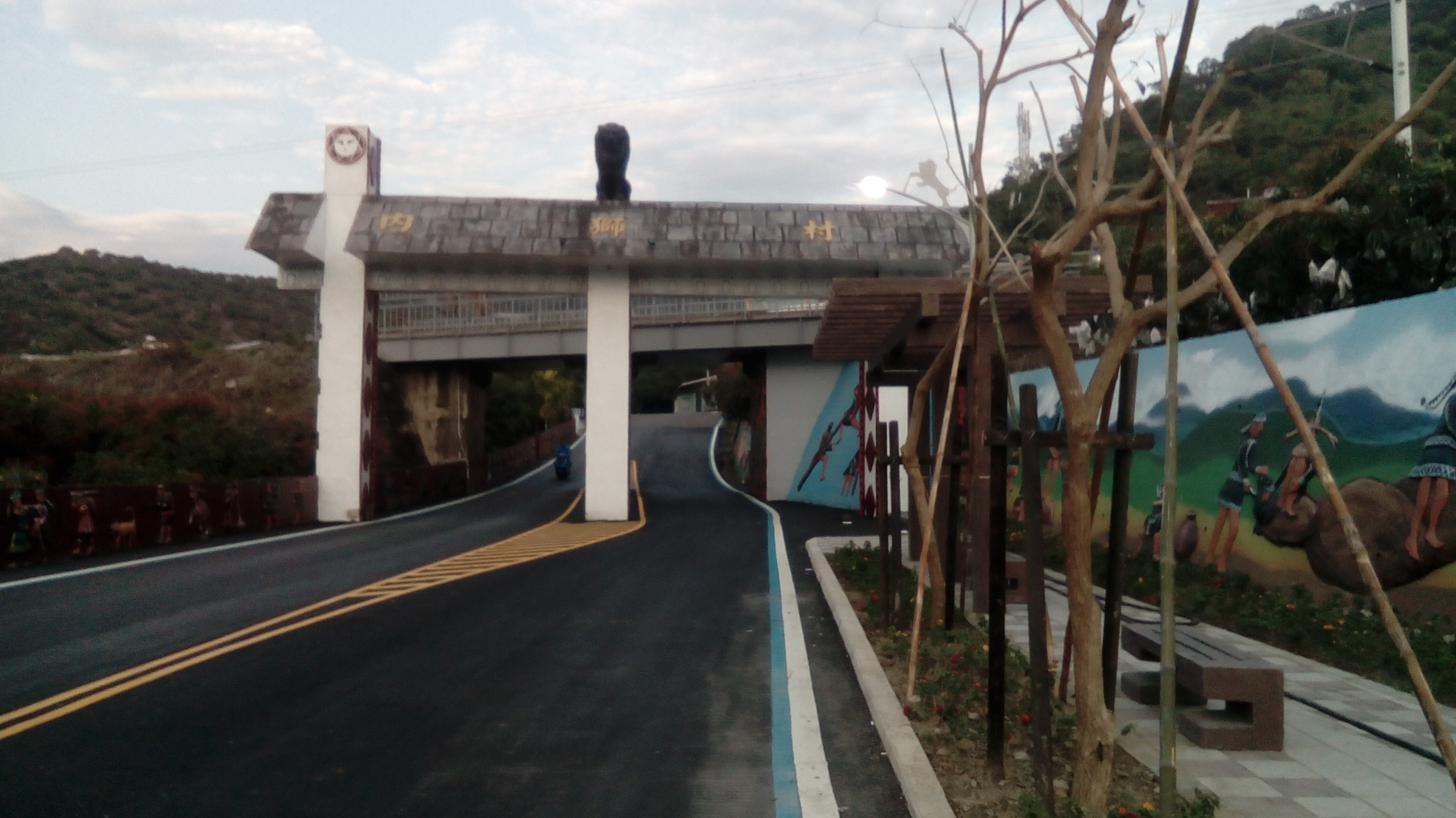 台一線南下447.6K處 「南勢-內獅聯絡道路」口